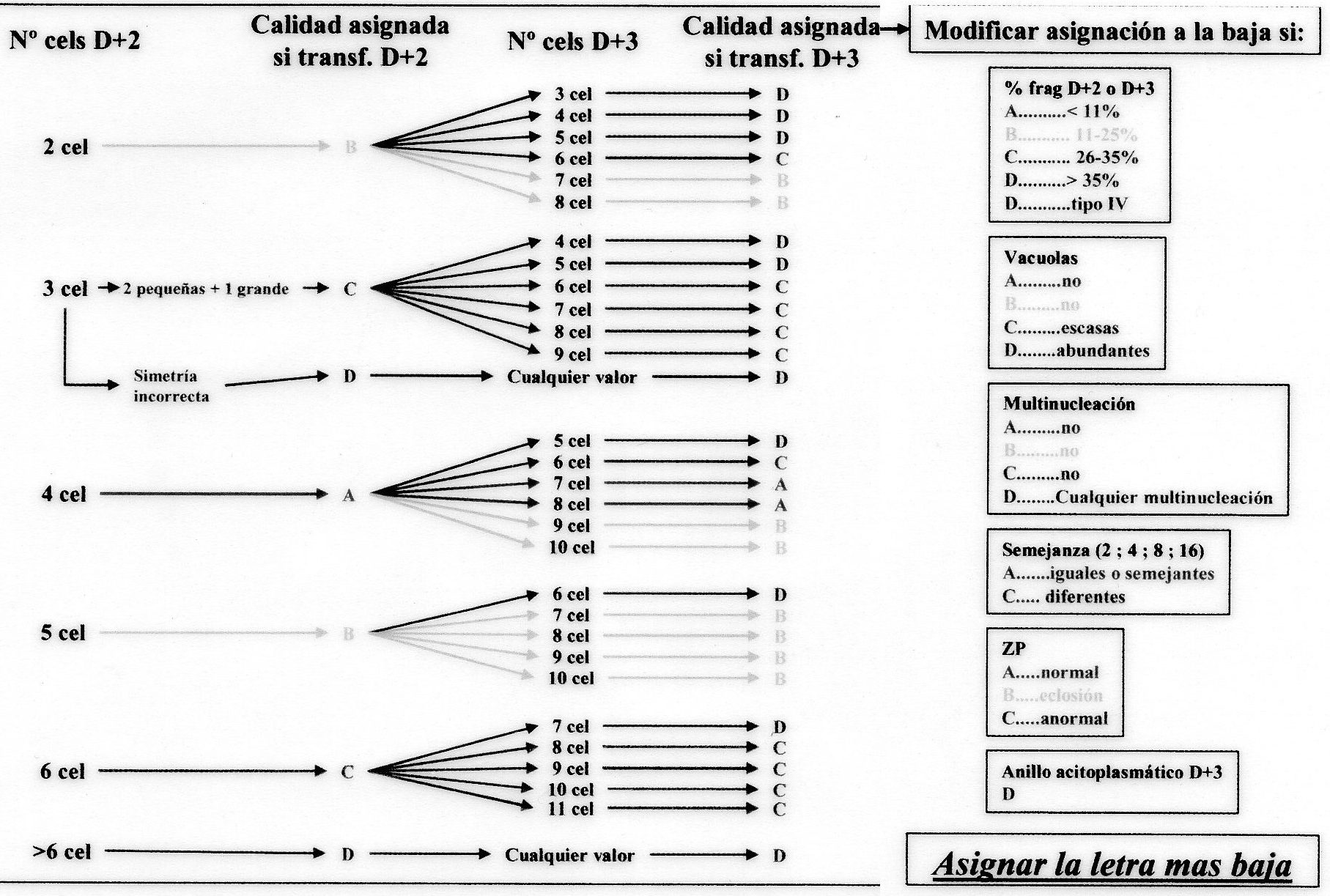 Calidad embrionaria en D2-D3 (criterio ASEBIR)